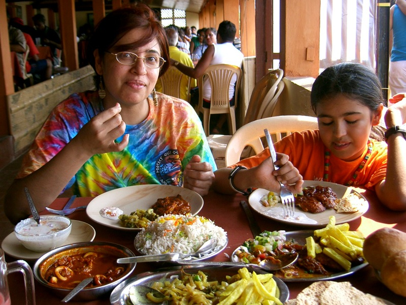 Ambotic de lulas (em baixo, à esquerda), um prato típido de Goa. Squid ambotic, a dish from Goa (below, left).